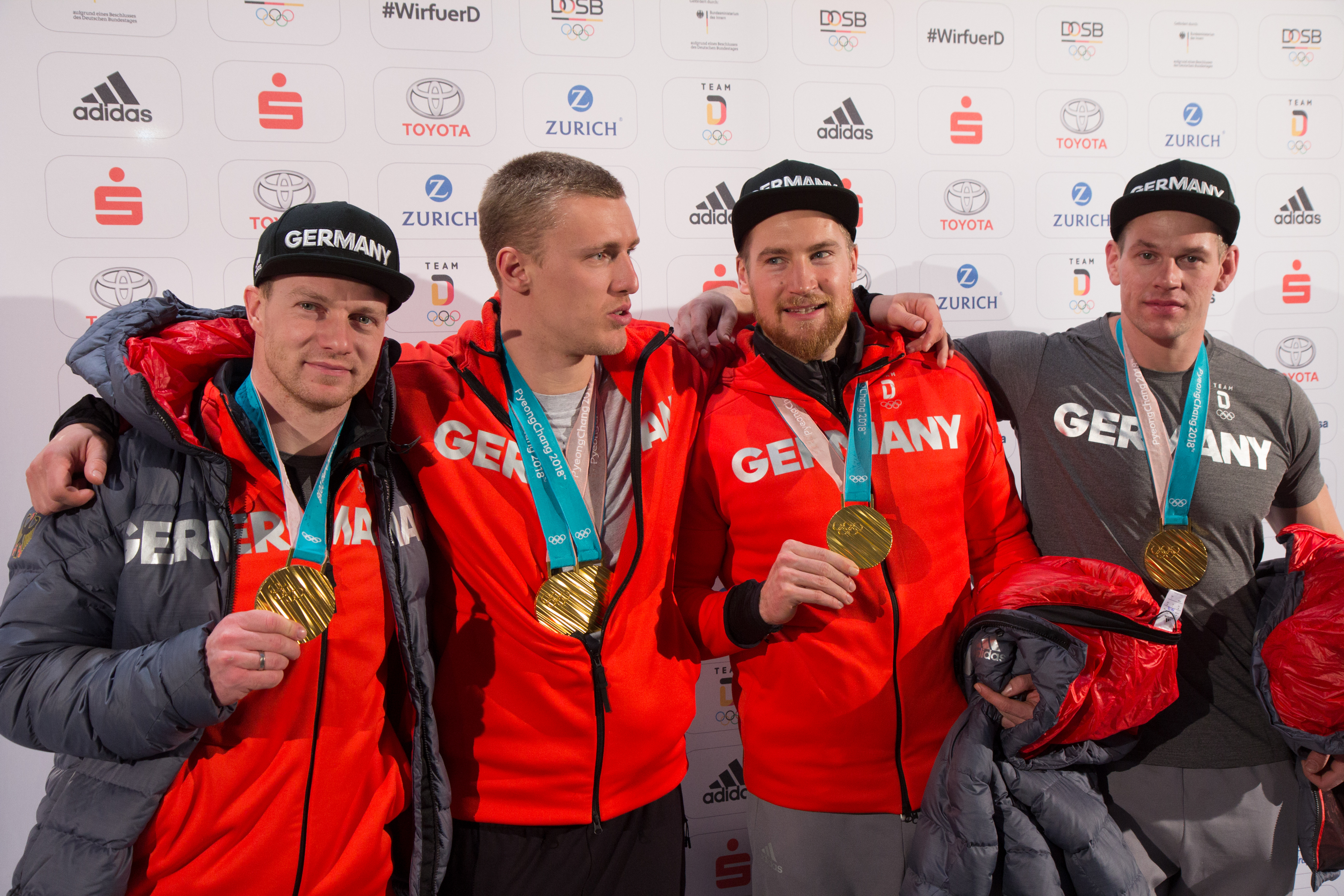 Ankunft der deutschen Olympiamannschaft am 26. Februar 2018 mit Flug LH713 auf dem Frankfurter Flughafen.